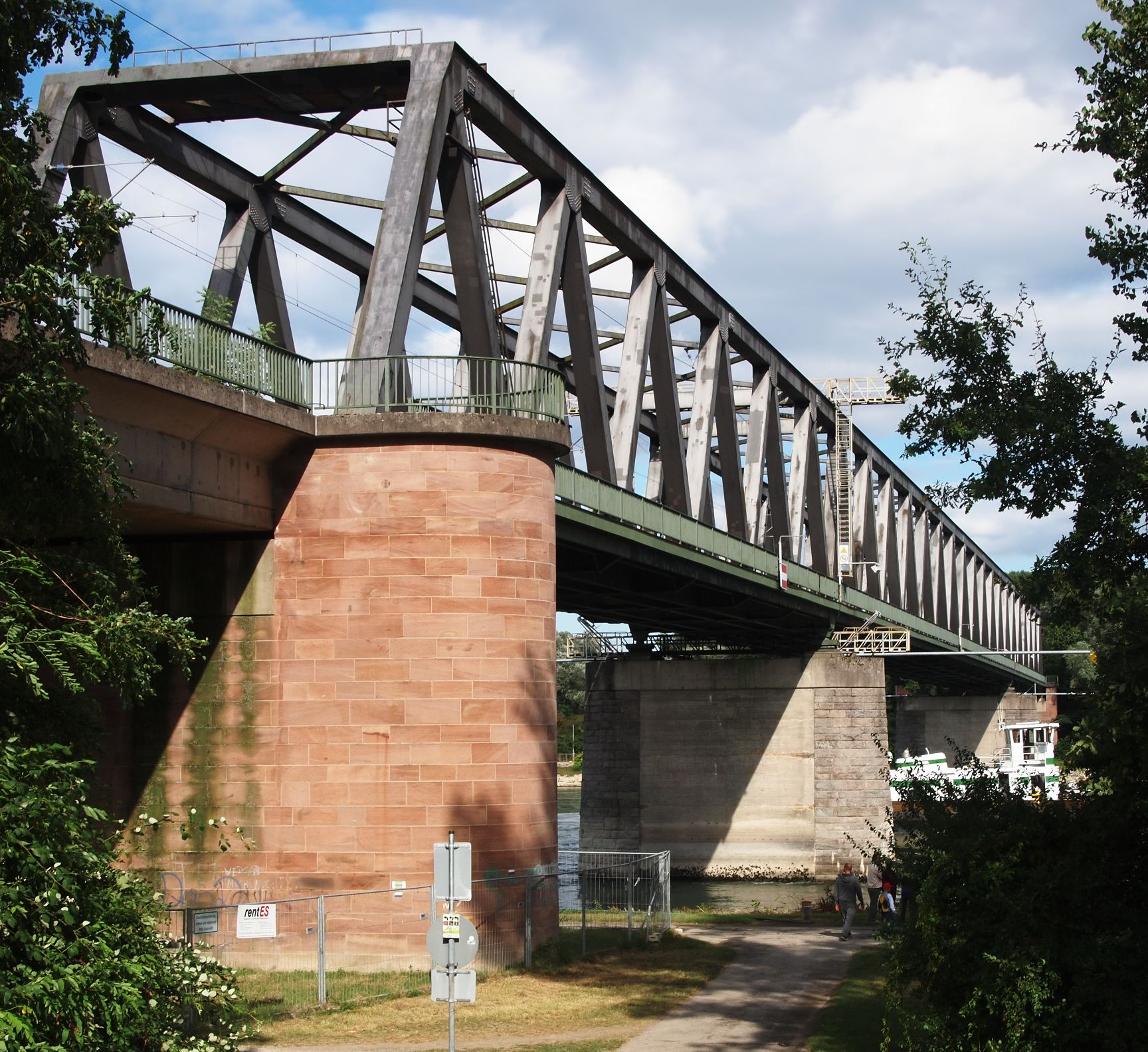 Rheinbrücke zwischen Germersheim und Reinsheim